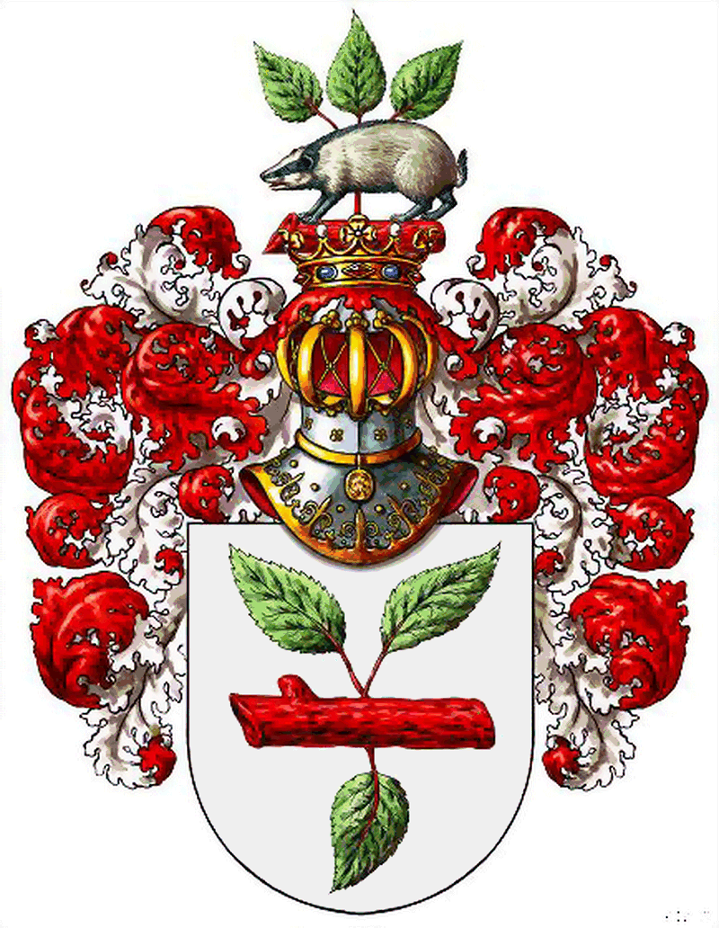 Stammwappen der von Graevenitz